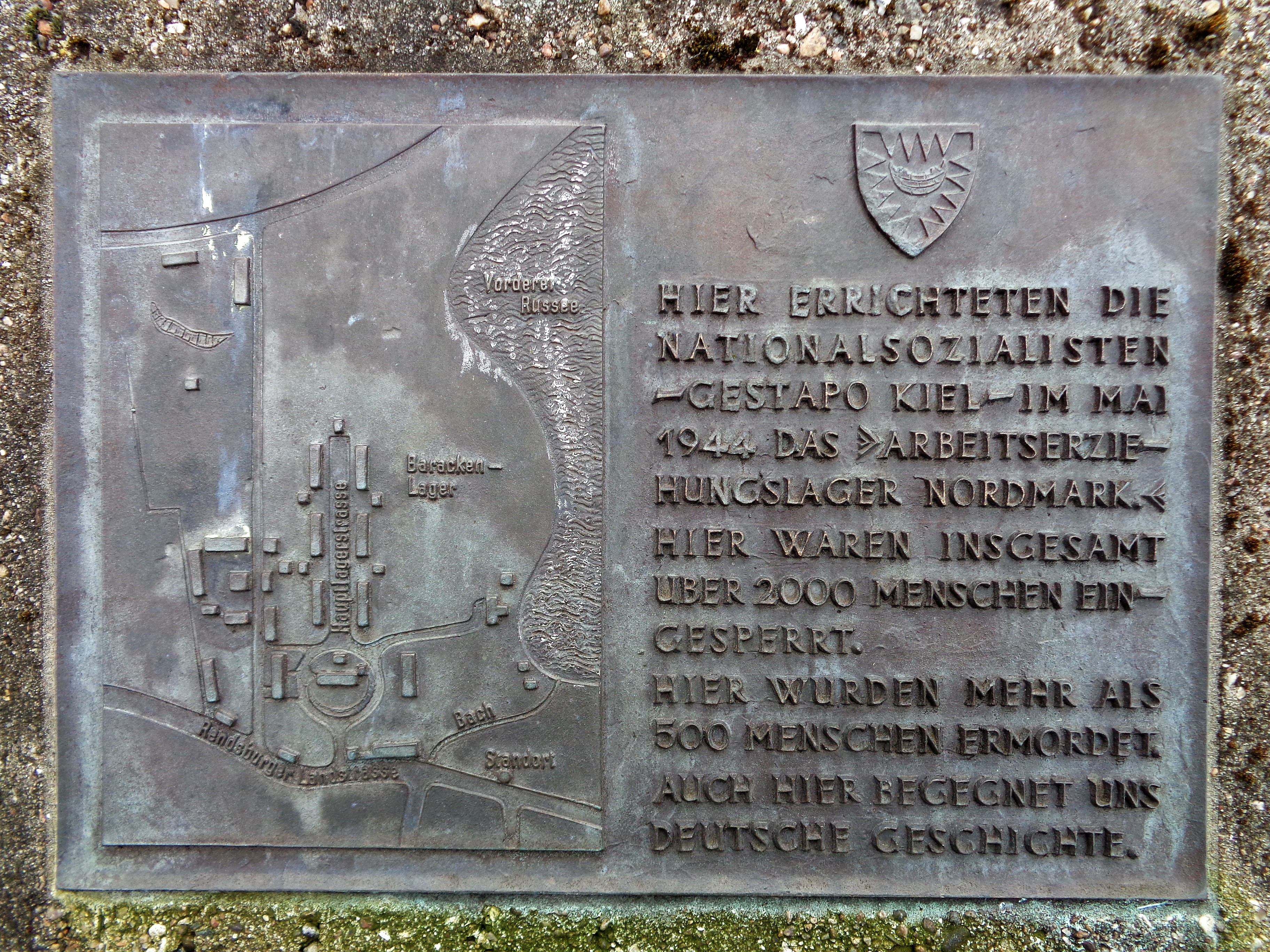 Informationstafel am Zugang zur Gedenkstätte „Arbeitserziehungslager Nordmark“ in Kiel-Russee.